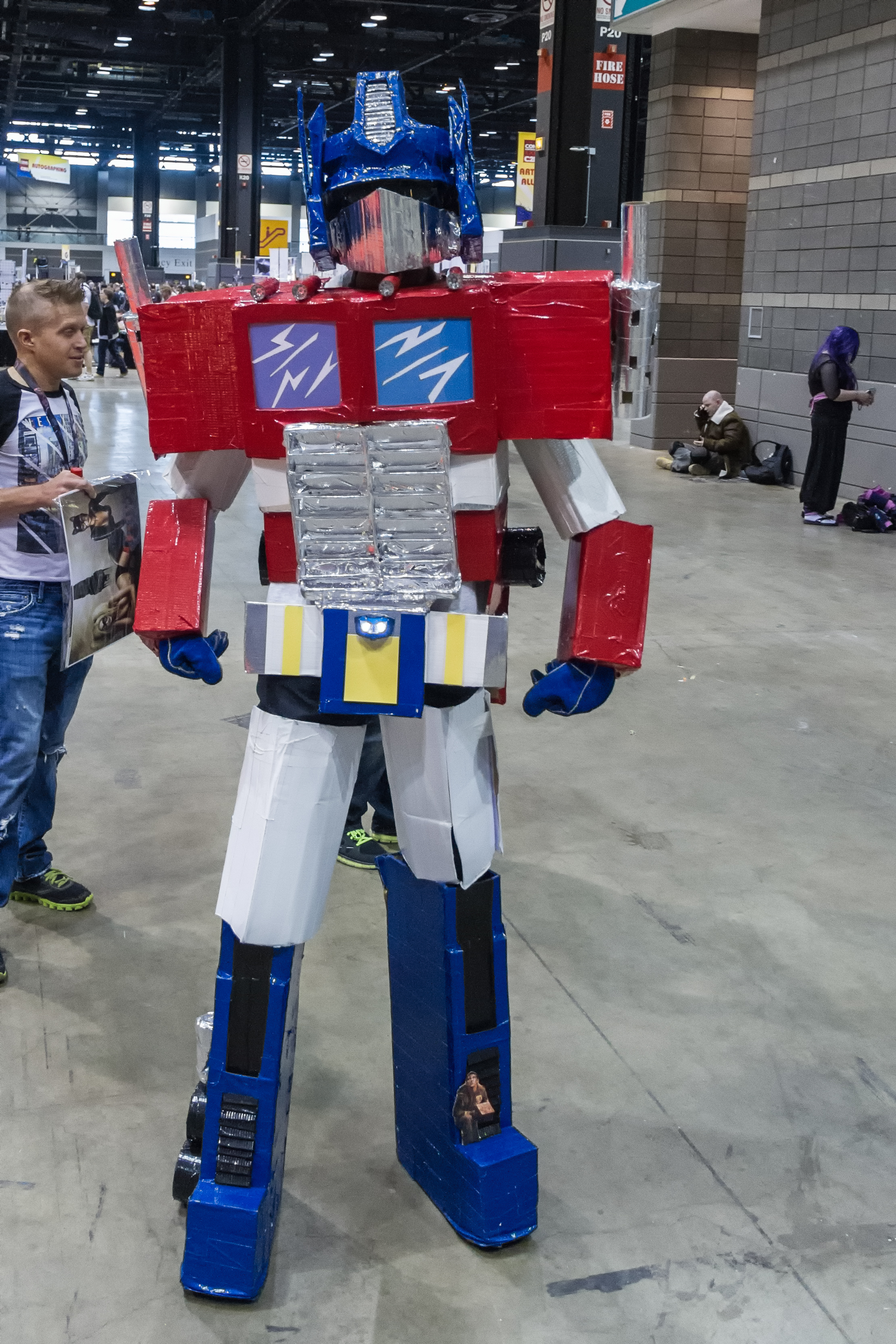 Optimus Prime